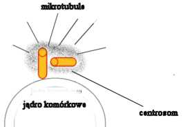 centrosom, mikrotubule i jądro komórkowe - schemat; autor:Dixi